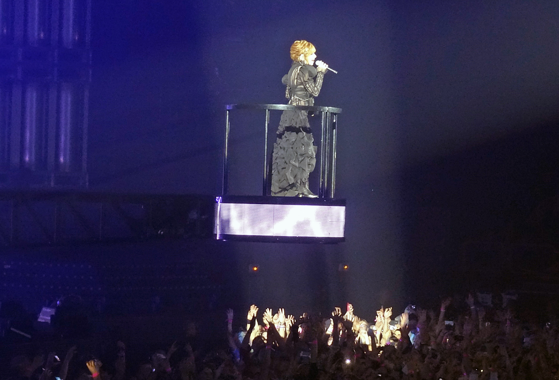 Mylène Farmer lors du concert Timeless 2013, le 10 septembre 2013 à Paris-Bercy, France.